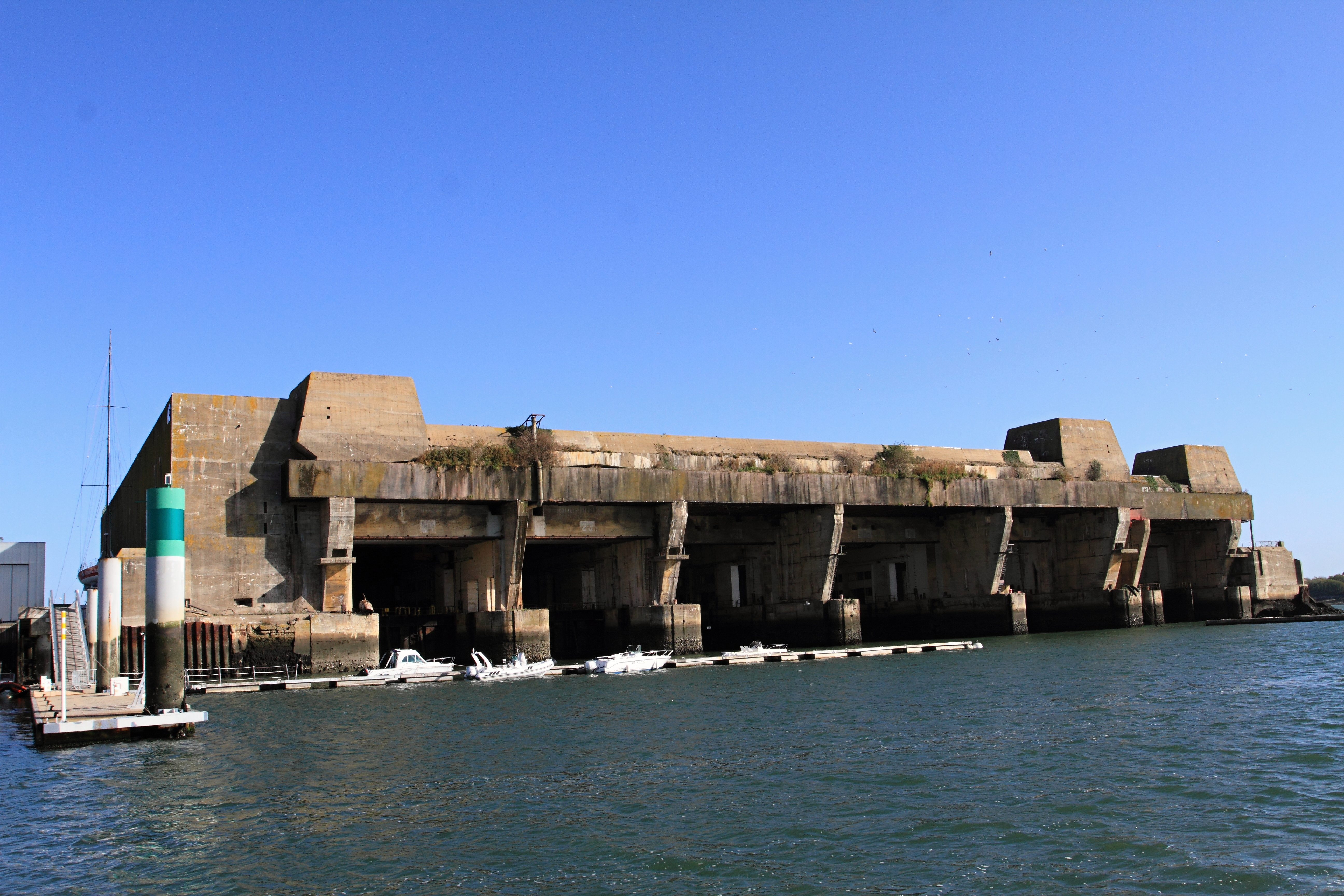 Lorient, ponorkový bunkr Keroman III